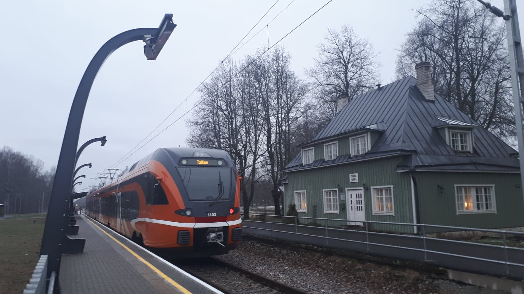 Elroni reisirong Turba peatuses.